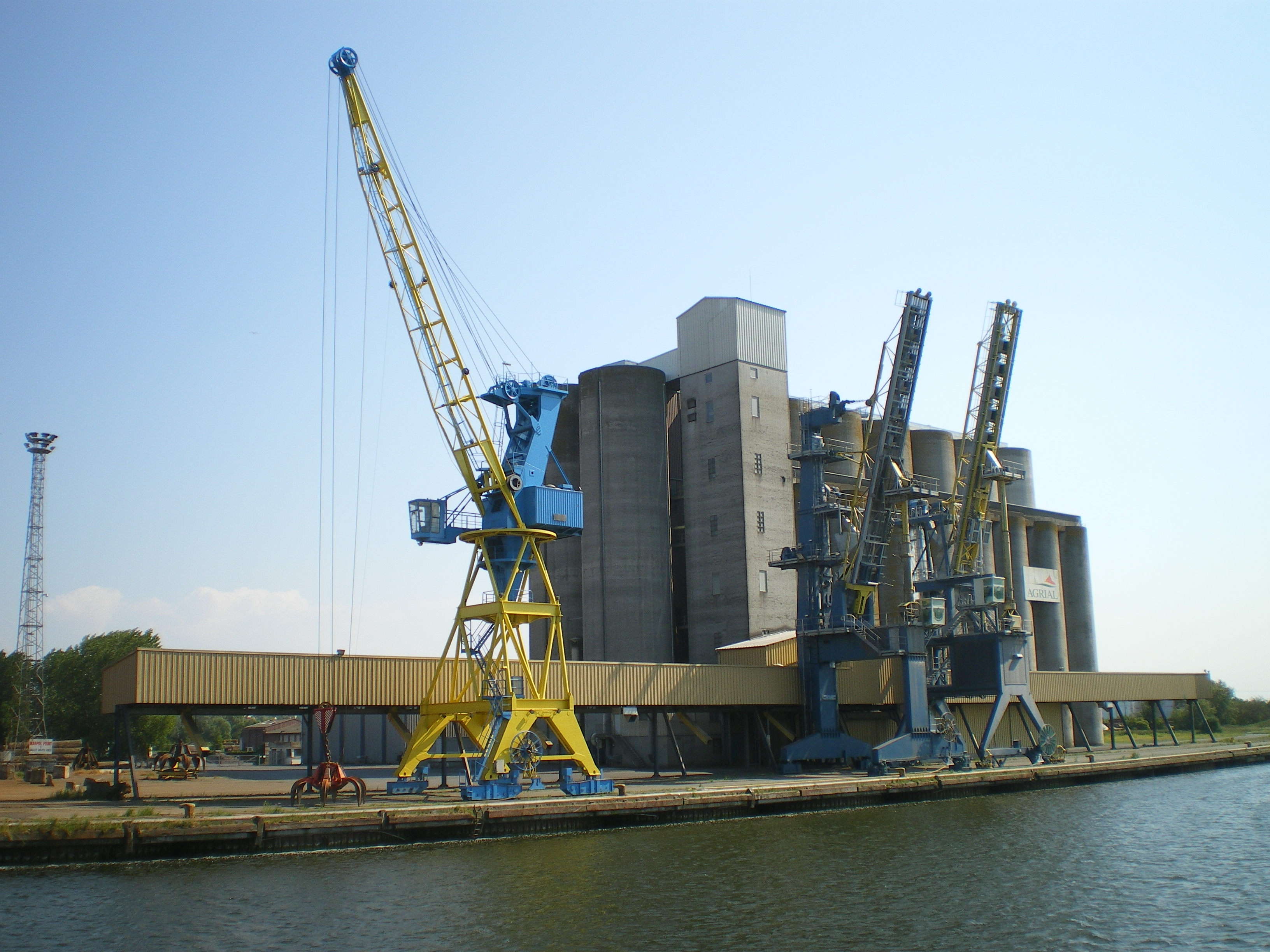 Le quai de Blainville sur la rive Est du Canal de Caen à la mer avec ses grues et les silos à blé d'Agrial.